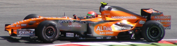 Sakon Yamamoto in Monza 2007